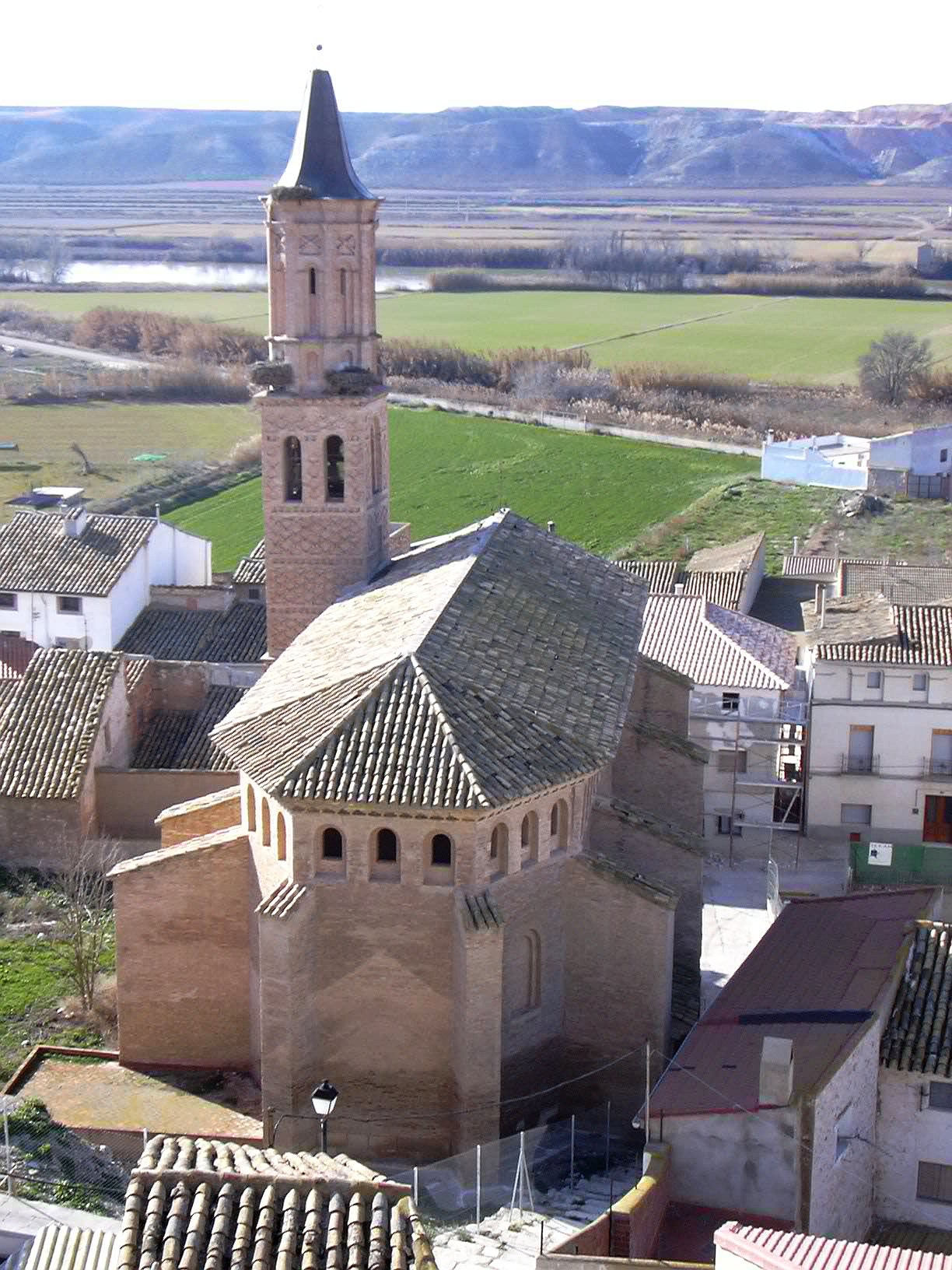 Velilla de Ebro (Zaragoza). En la vista la iglesia parroquial de la Asunción, de estilo mudéjar